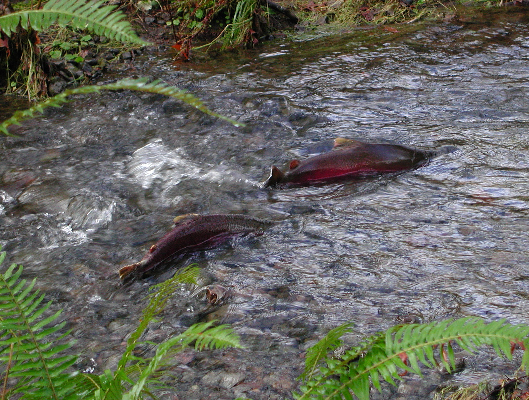 Homestead coho salmon